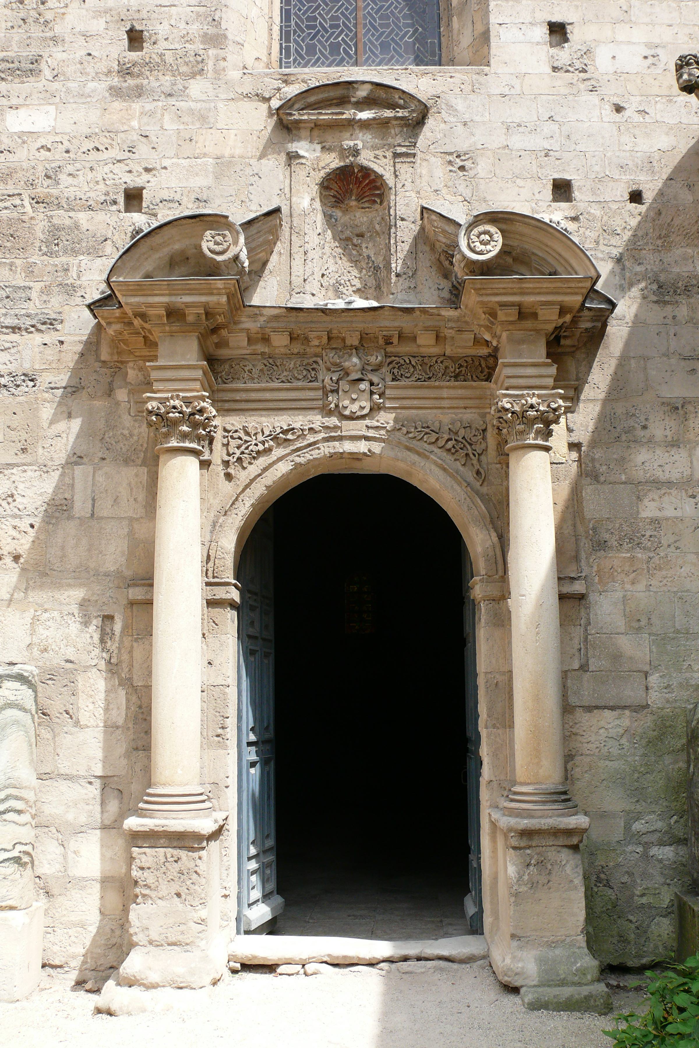 Barockes Portal der Kirche St.Honorat